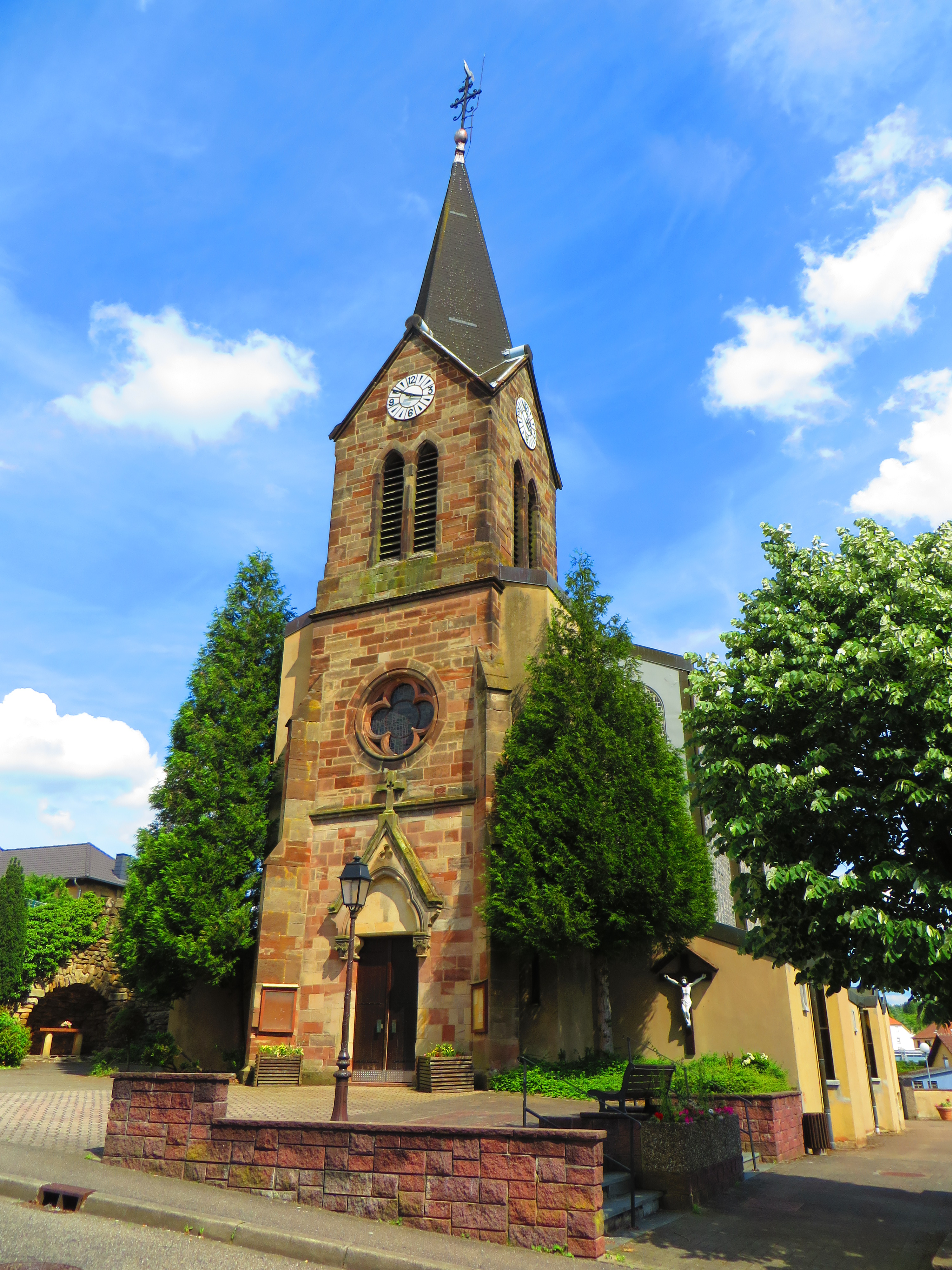 Schoeneck Église Saint-Joseph